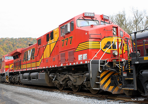 Triple 777 a Száguldó Bomba főszereplő mozdonya, a Google-keresés által megtalálva. Forrás: Általam ismeretlen.